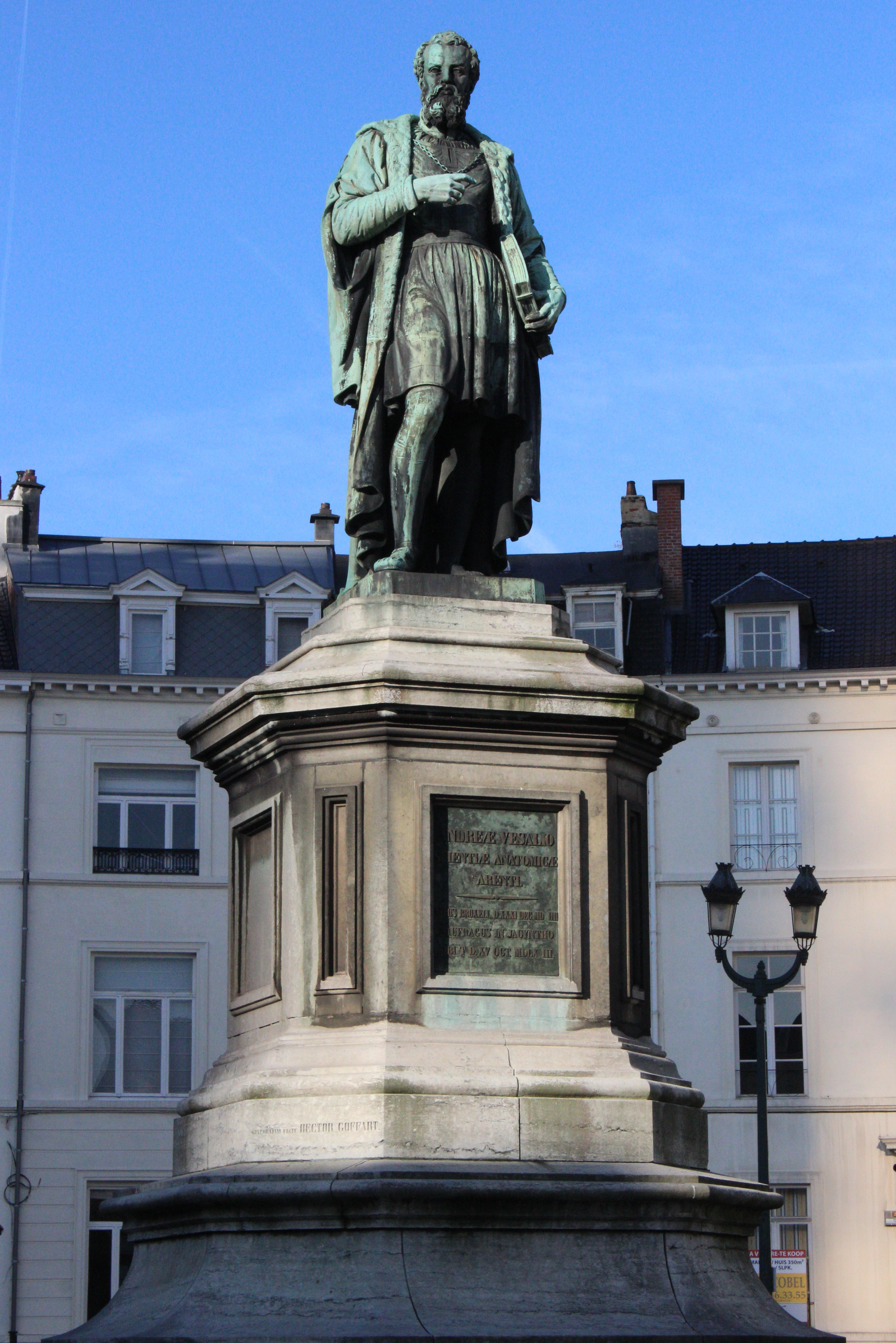 Place des Barricades, Bruxelles, Belgique. Statue d'André Vésale par Joseph Geefs (1846)